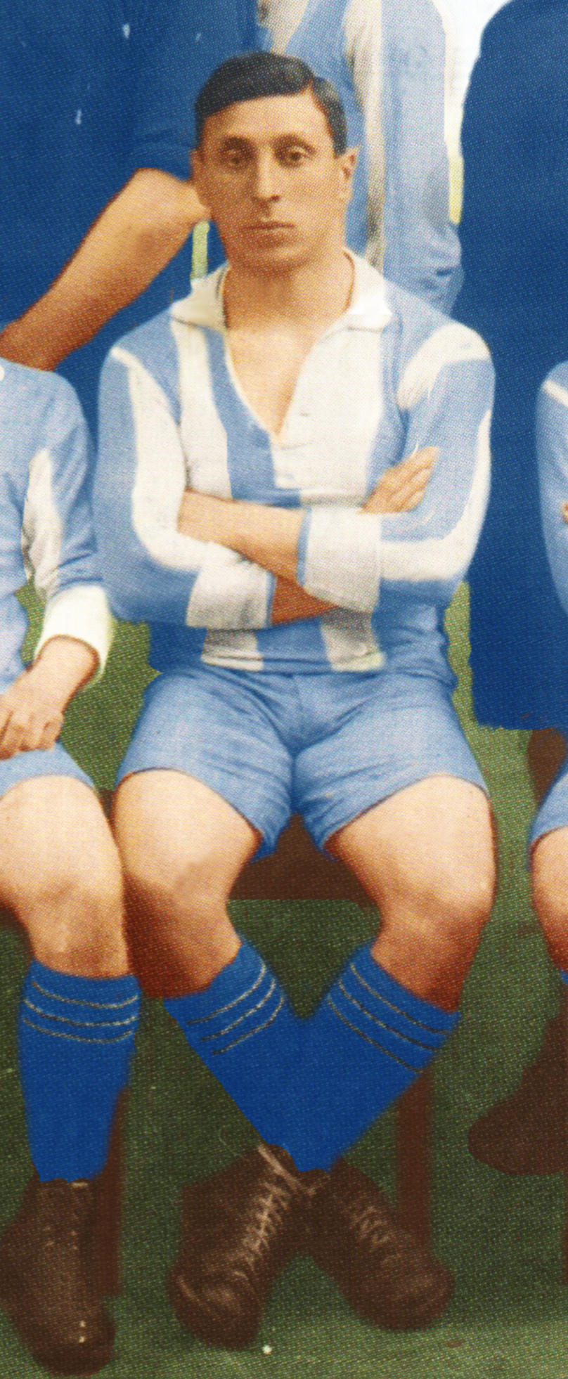 Ο Γιώργος Καλαφάτης με την εθνική αποστολή ποδοσφαίρου στους Διασυμμαχικούς Αγώνες στο Παρίσι το 1919